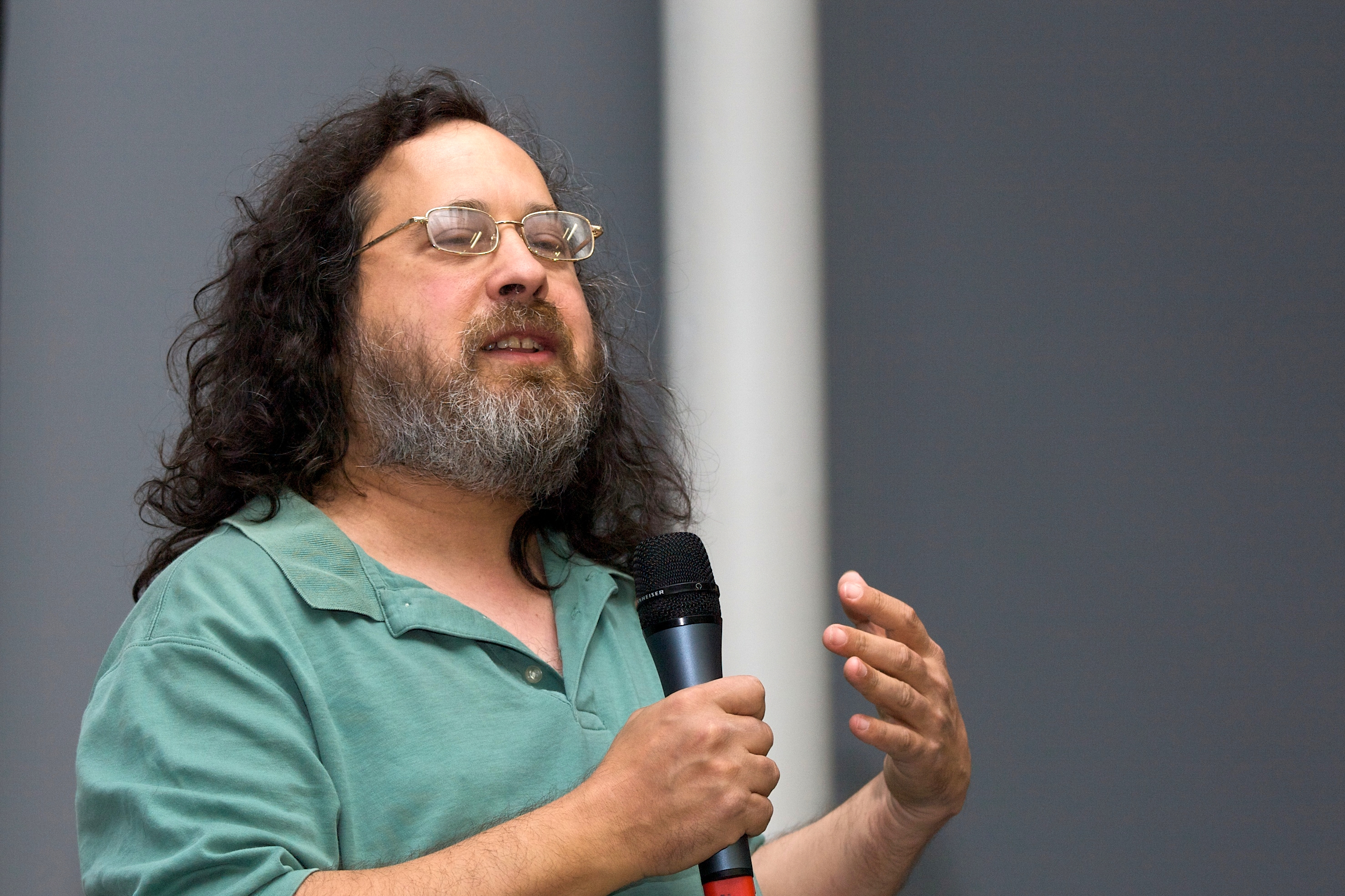 Richard Stallman - conférence sur le libre à la biennale du design de Saint Etienne